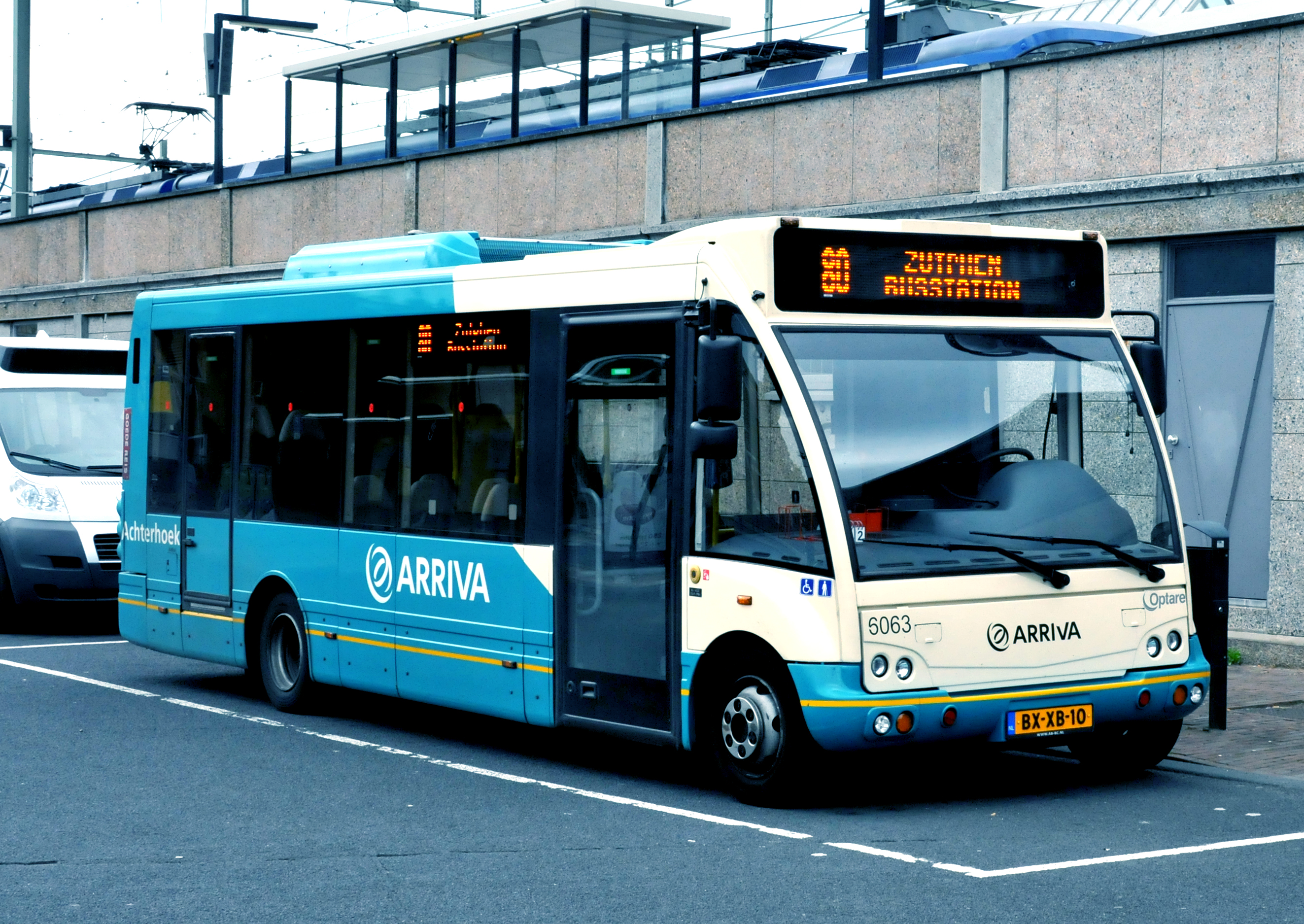 Arriva bus 6063 van het type Optare Solo te Zutphen.